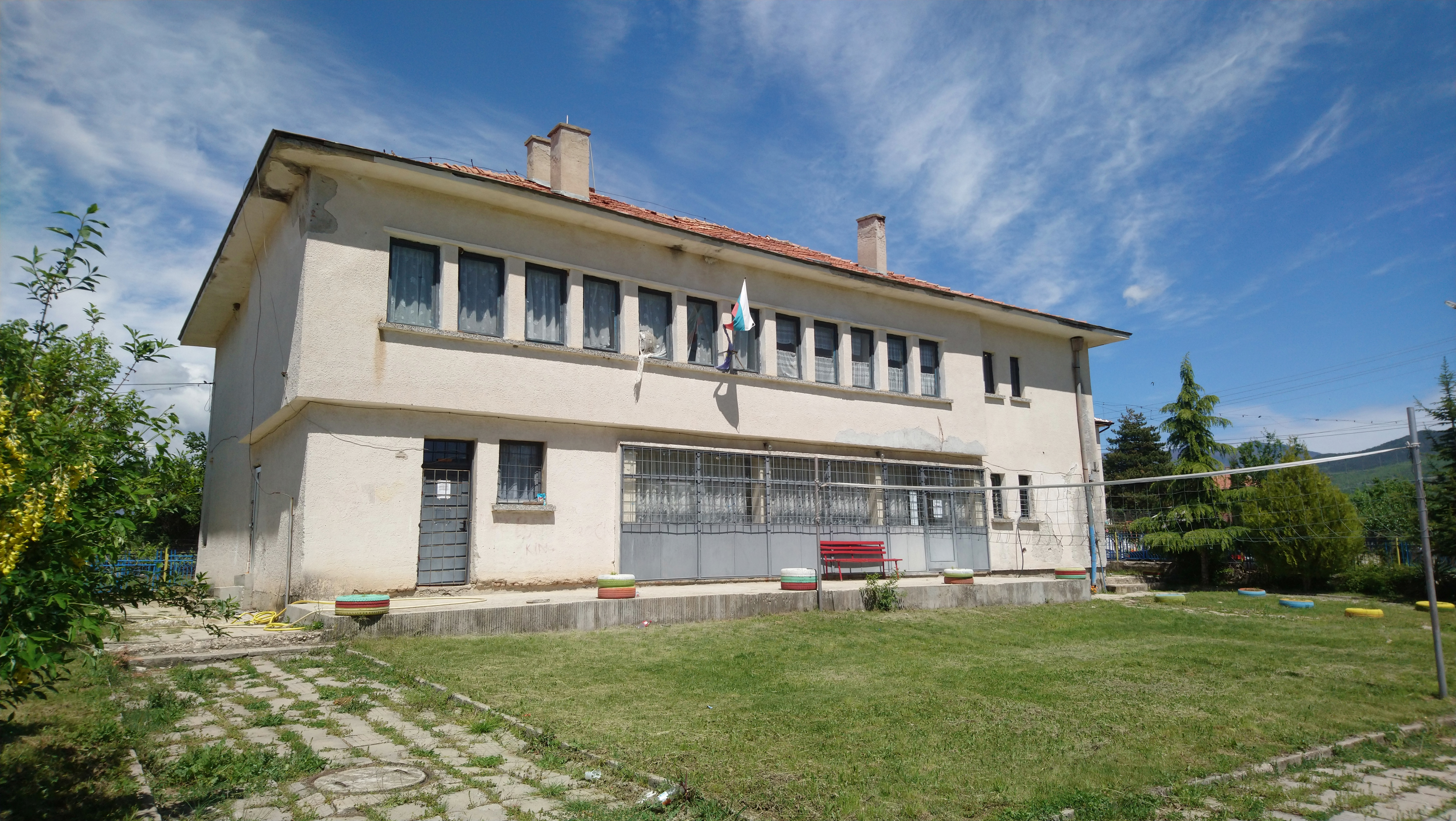 Кметството на село Яново, Община Сандански